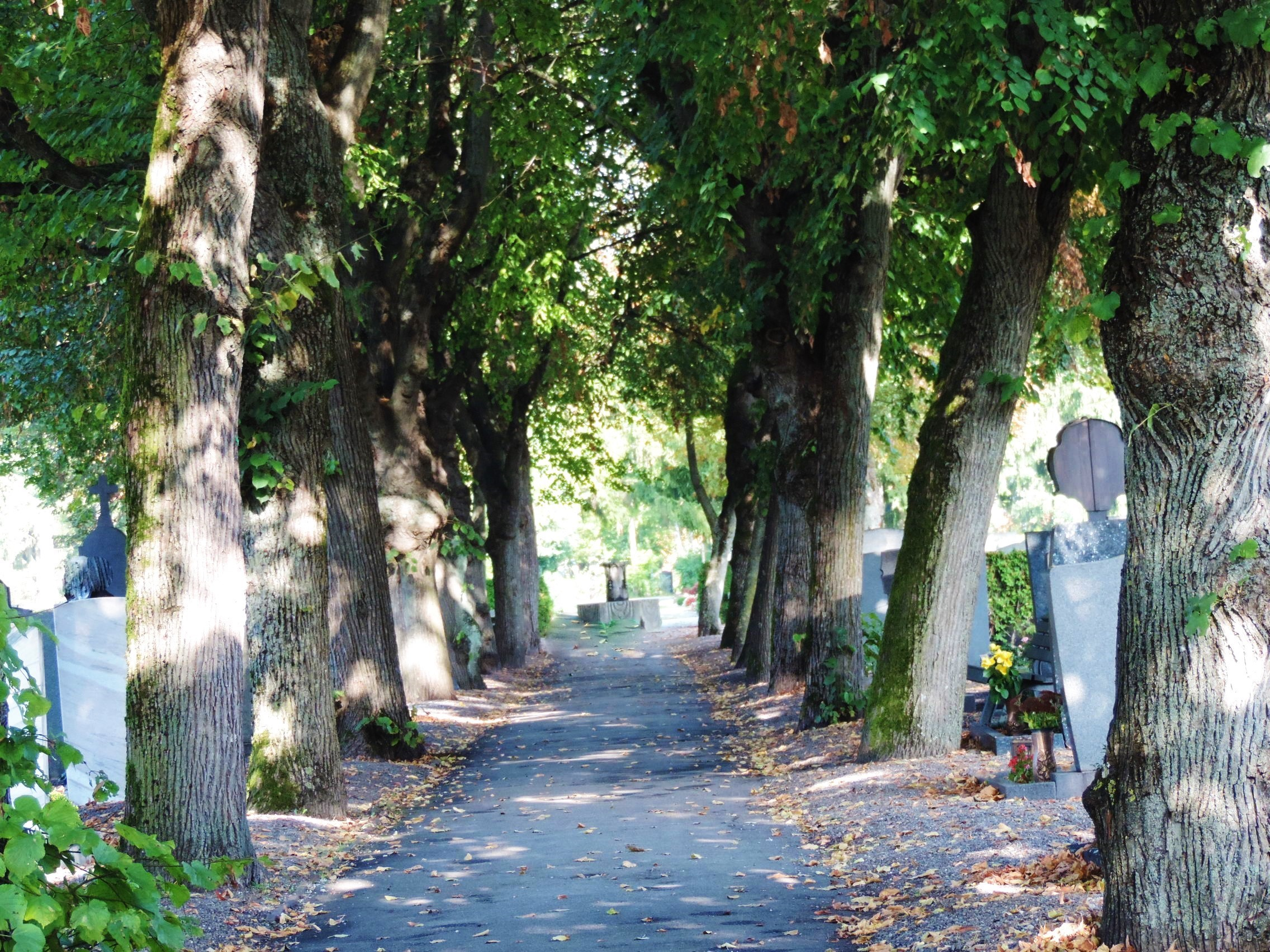 Lindenallee Alter Ostfriedhof Augsburg